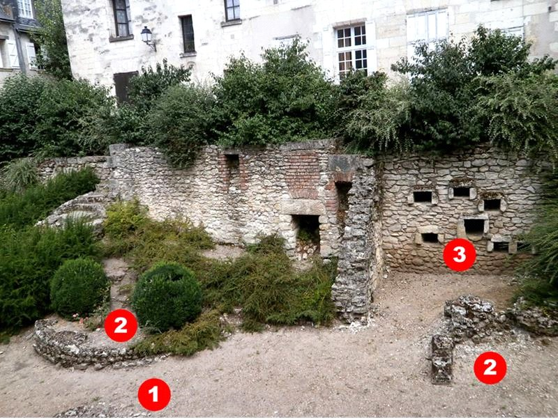 Fosse archéologique de Saint-Pierre le Puellier (Tours) (1) murs du premier siècle (2) murs des second et troisième siècles (3) tombes médiévales